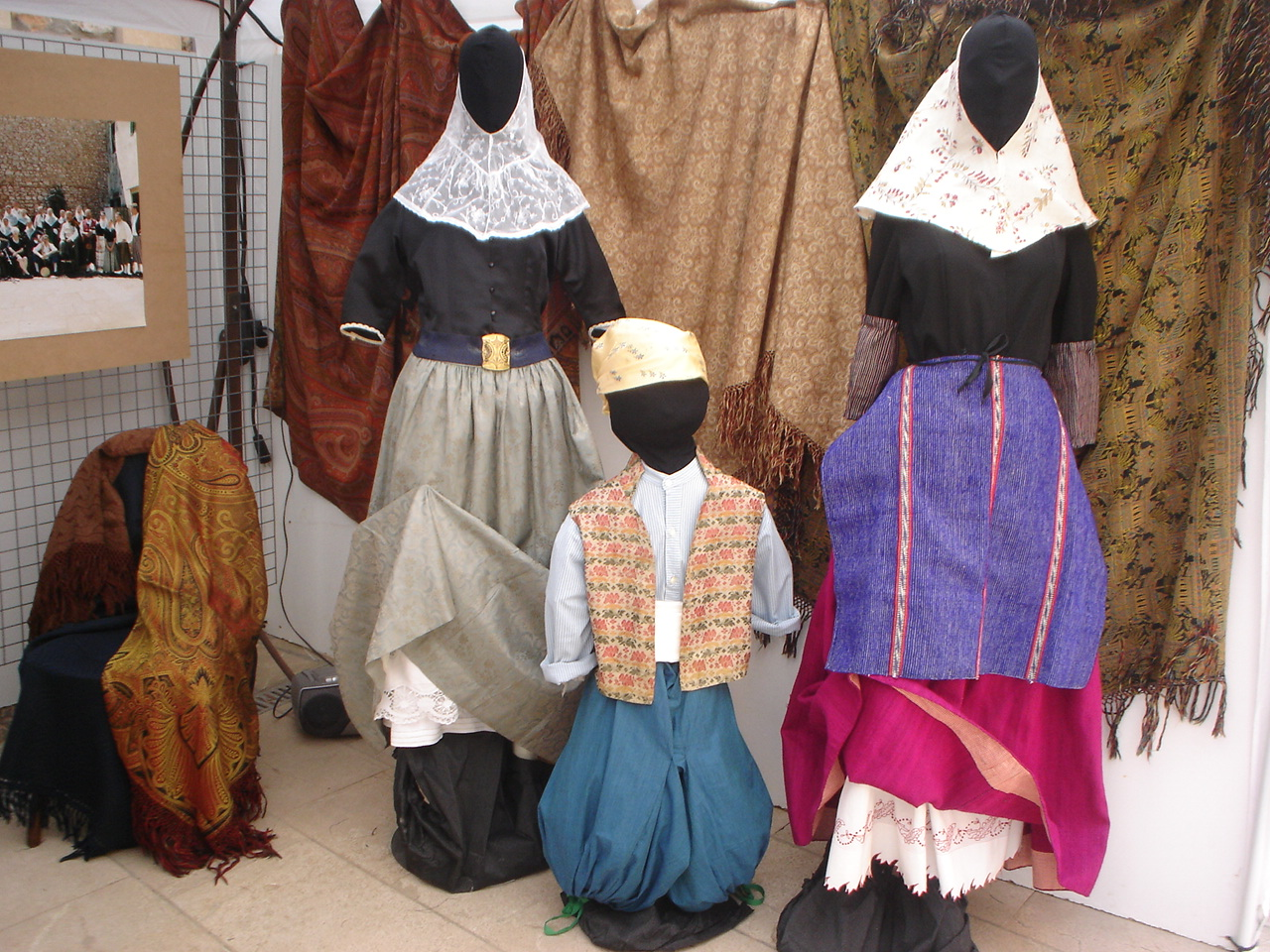 Vestits tradicionals de Mallorca